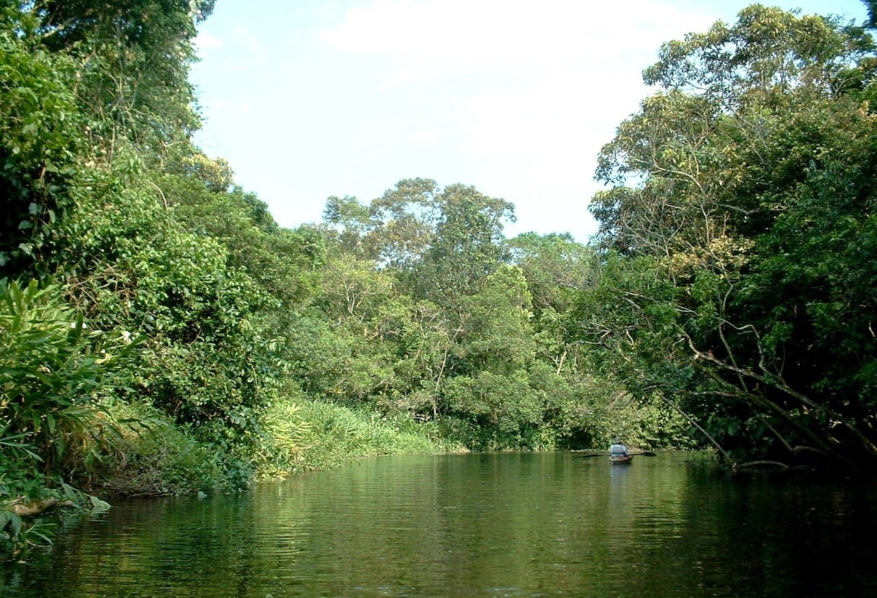 Serra Do Mar State Park